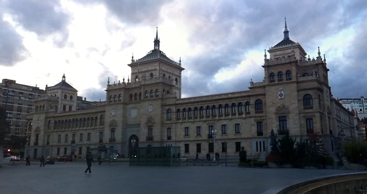 Academia Militar de Caballería, Valladolid, España.